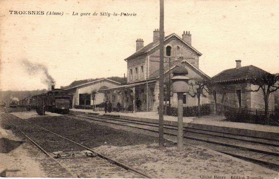 La gare de Silly-la-Poterie, près de Port-aux-Perches. C'est l'unique gare de la section La Ferté-Milon - Villers-Cotterets.